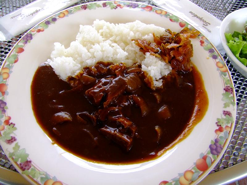 ハヤシライス（東京・台東区上野公園4-58、上野駅・京成上野駅最寄り、上野恩賜公園にある1876年に開業した老舗の洋食屋・西洋料理店「上野精養軒」[1]屋上レストラン）